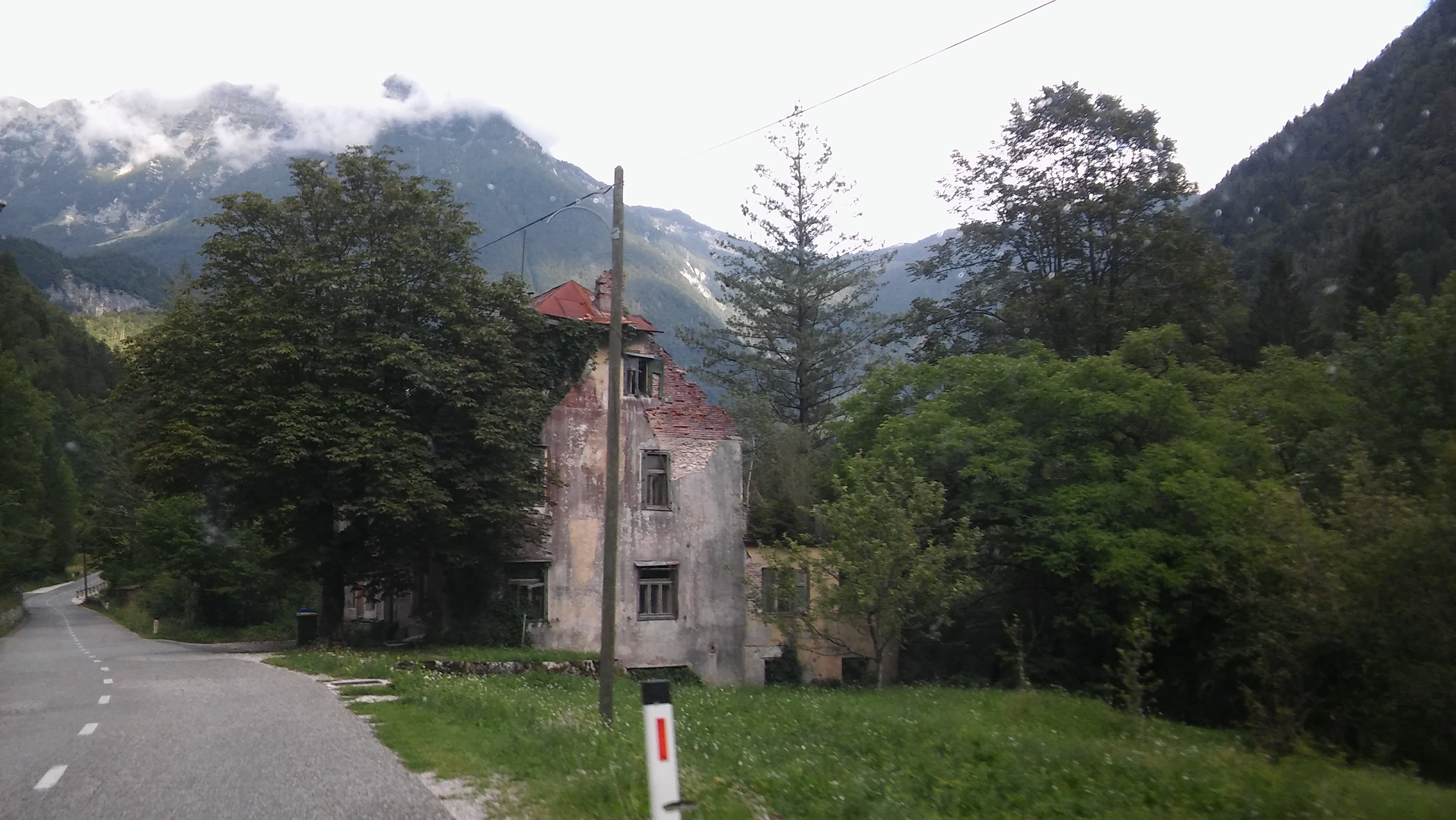 Erdbeben Soča 1